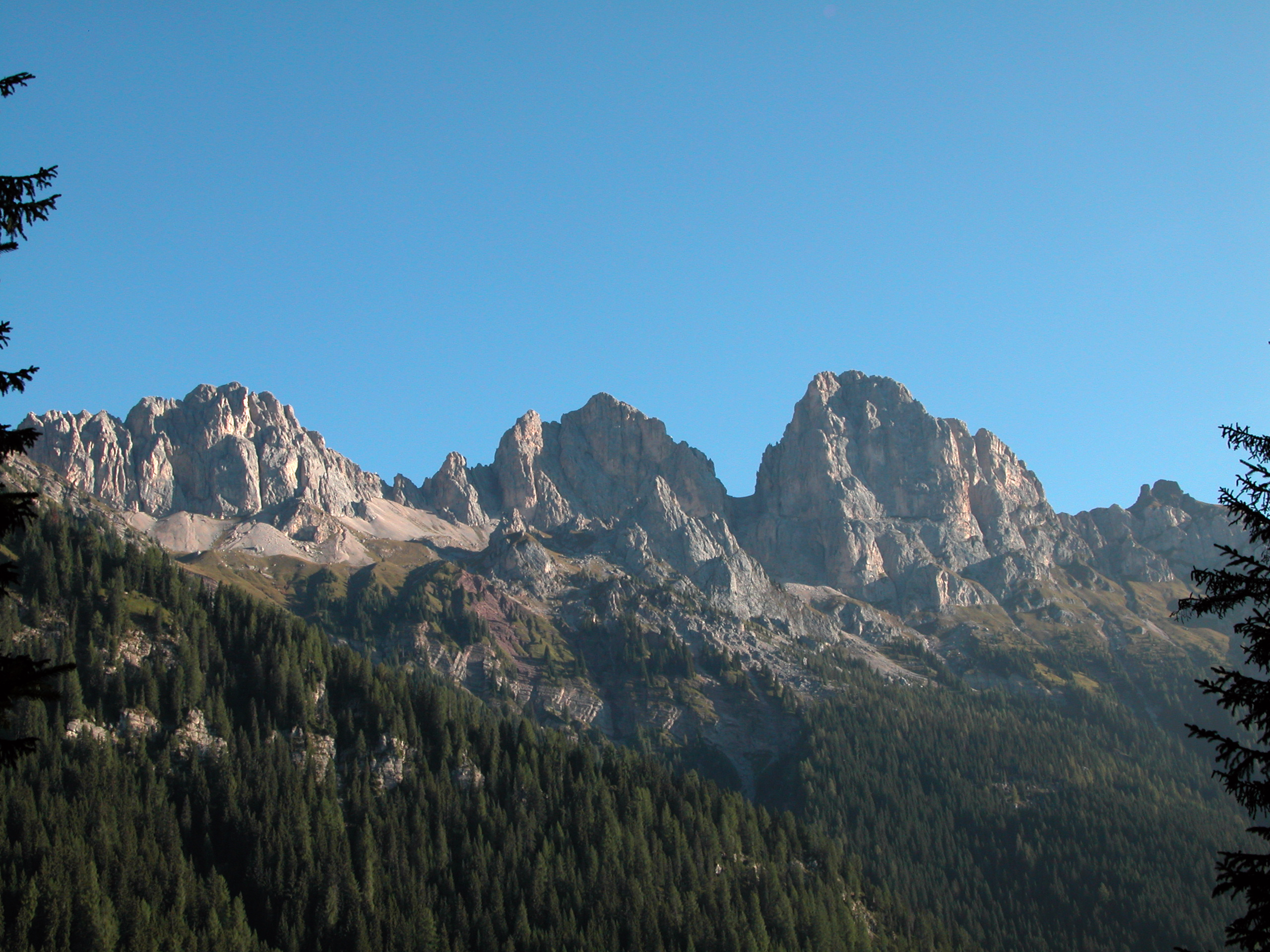 Il gruppo delle cime d'Auta dalla Valle del Biois. Dolomiti-Belluno